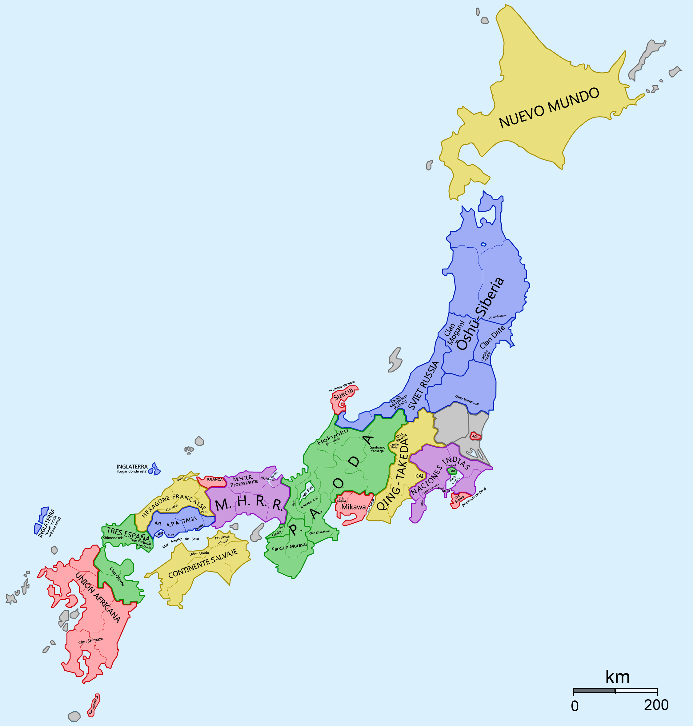 Mapa realista de Japón realizado por Ozmalee, en base a lo leído en las novelas ligeras de Kyōkai Senjō no Horizon. (Mapa ficticio de Japón) Los colores son solo para separar un territorio de otro, aún si 2 territorios por separado tienen el mismo color no tienen relación entre ellos.